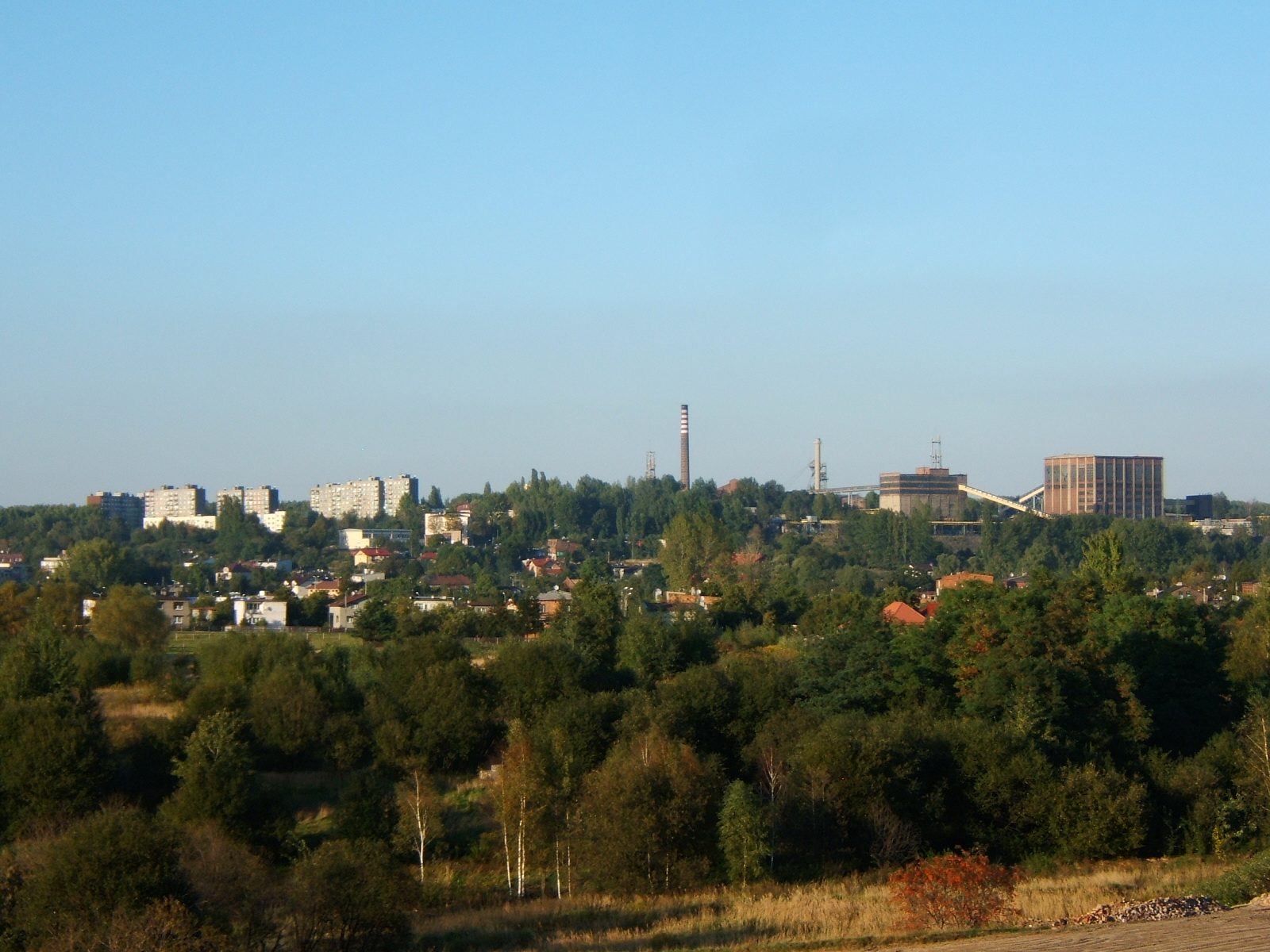 Panorama na Kolonię Thurzo w Rudzie Śląskiej.